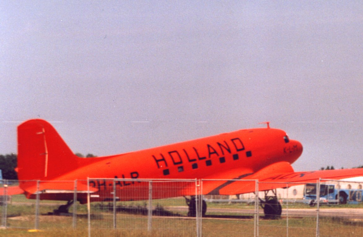 Orangefarbene DC-3